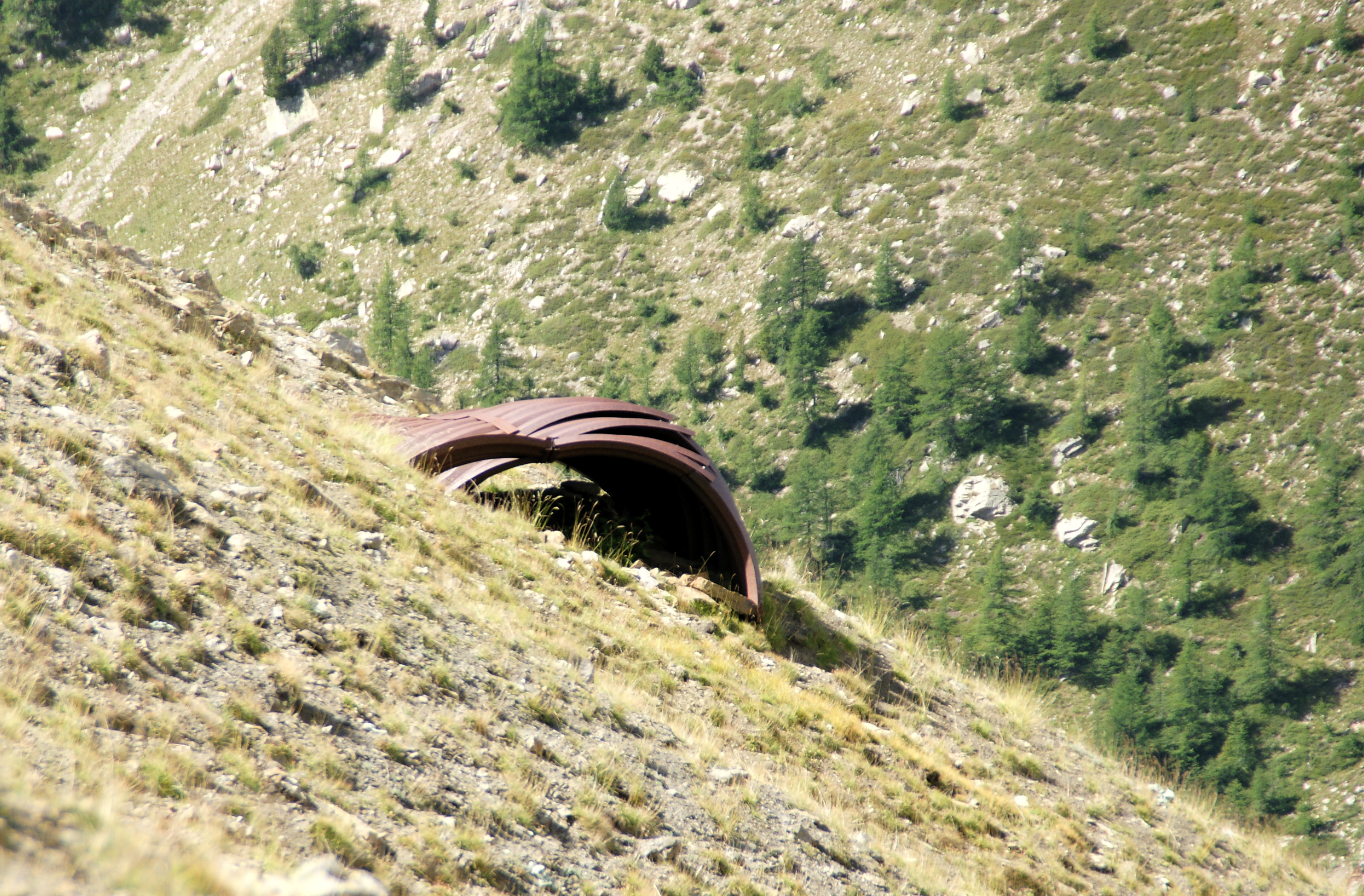 Un abri rudimentaire restant de la dernière guerre, sous la crête descendant au sud-ouest de la pointe de Chaufrède